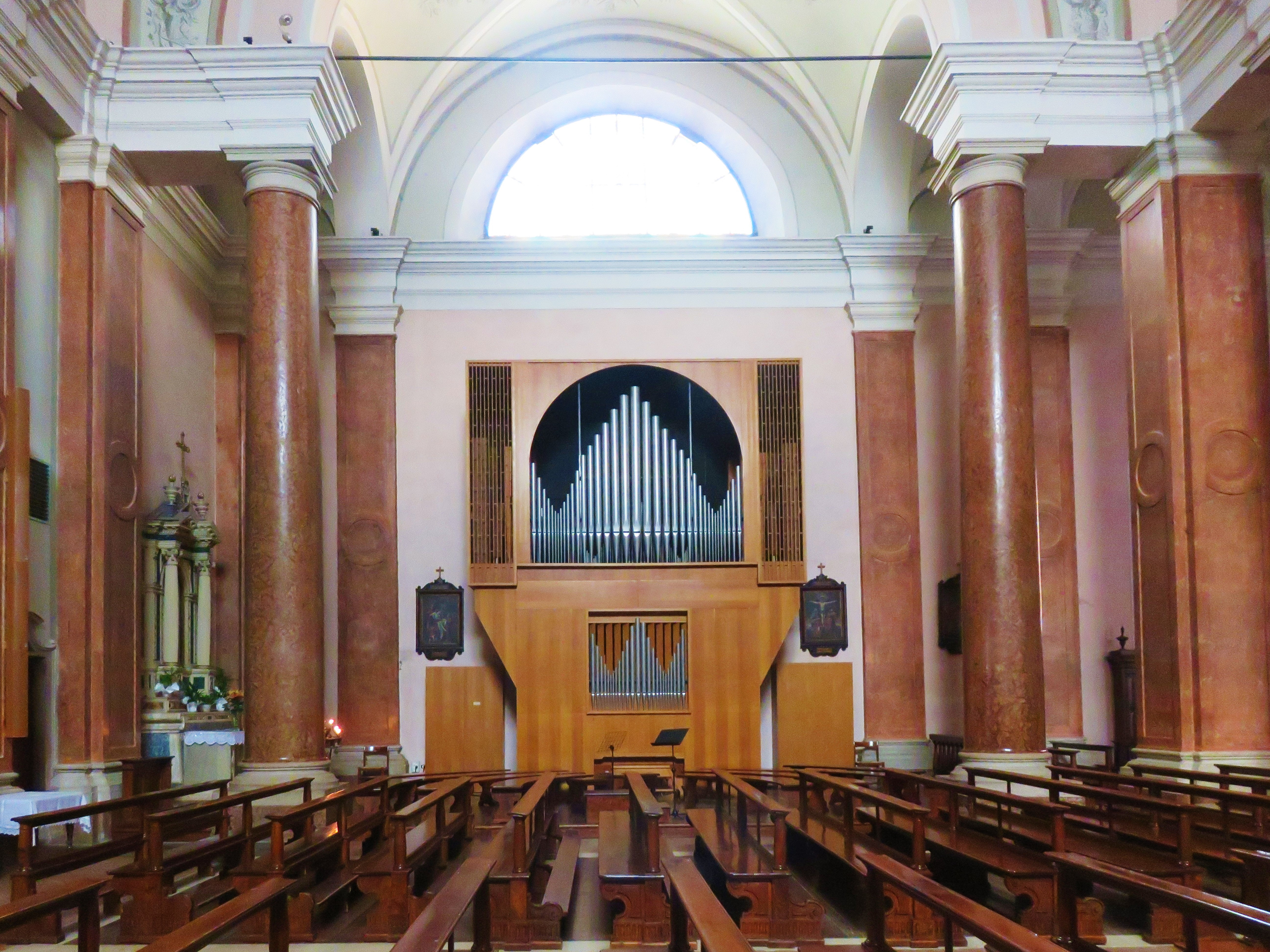 Chiesa della Visitazione di Maria Santissima di Gardolo. Organo.